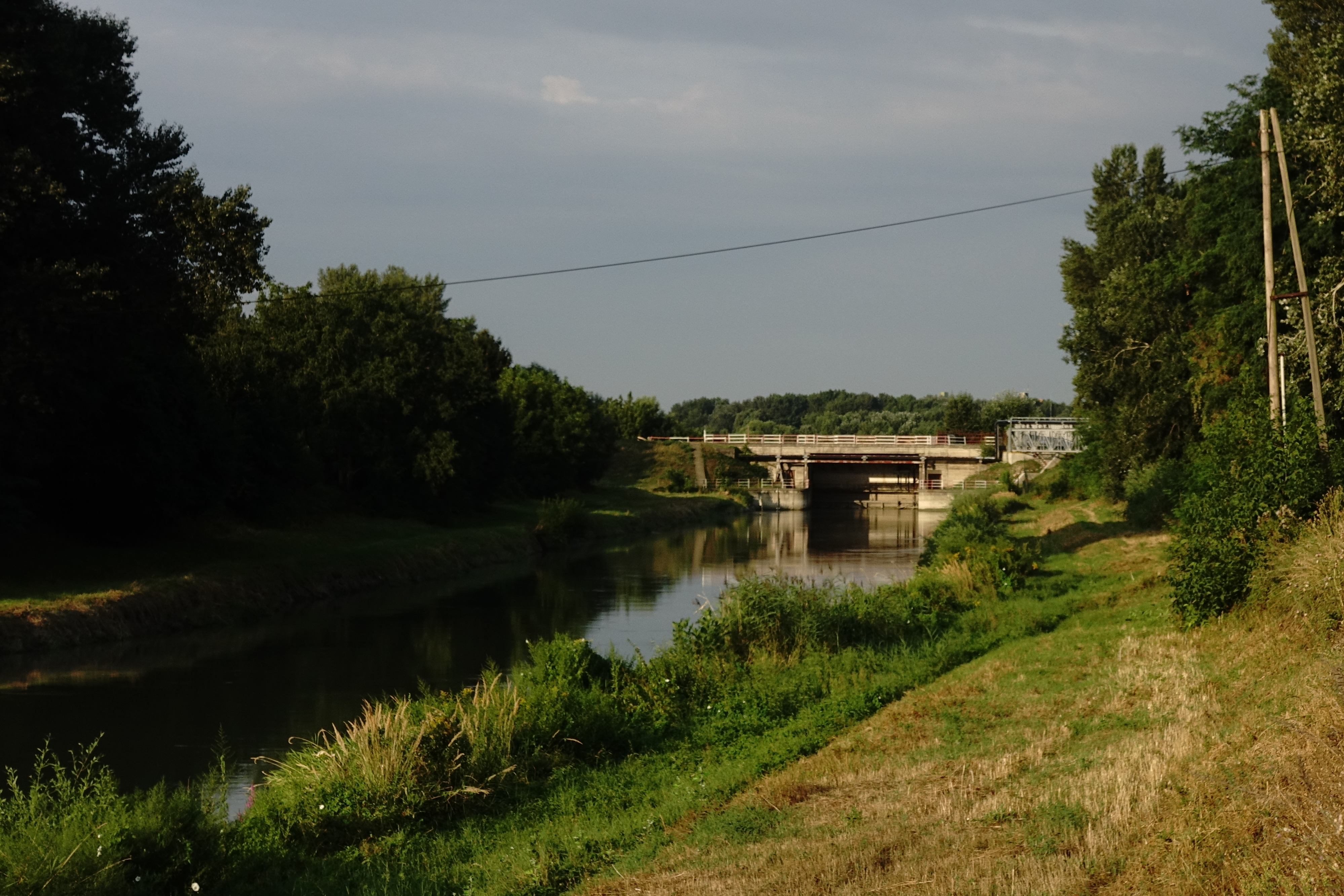 Starý nápustný objekt Malého Dunaja a začiatočný úsek jeho toku v Bratislave. Približne po 500 metroch v smere toku je vybudovaný nový nápustný objekt.